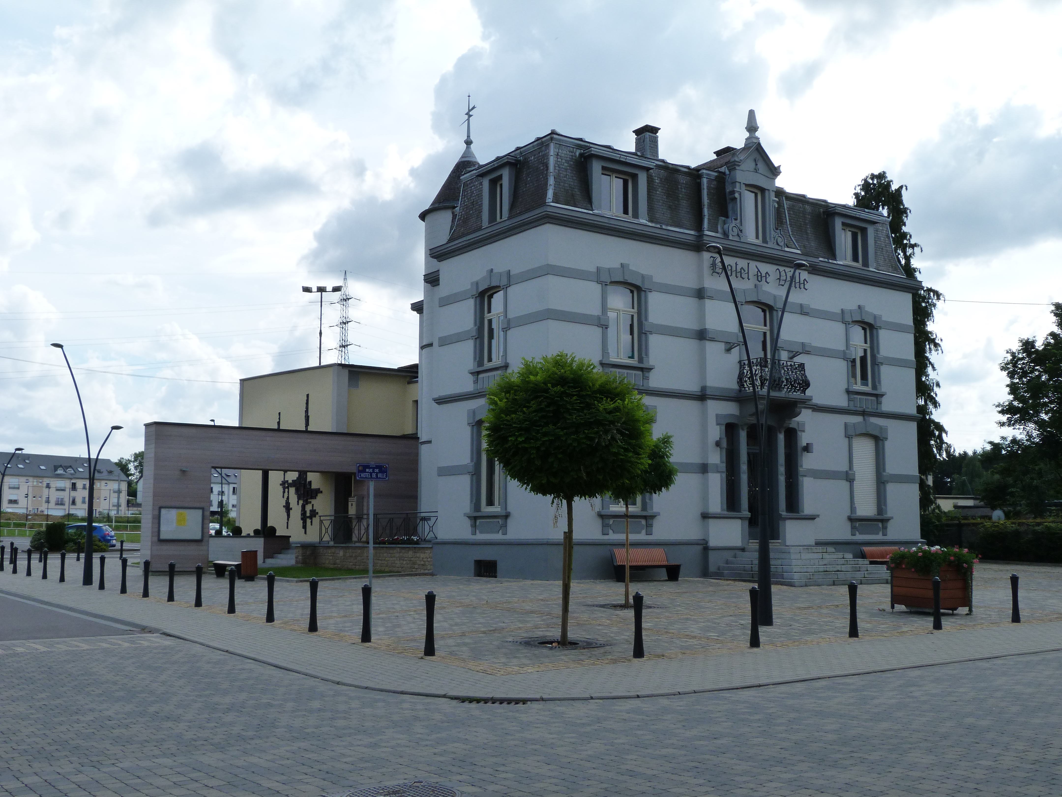 L'hôtel de Ville de la commune d'Aubange à Athus